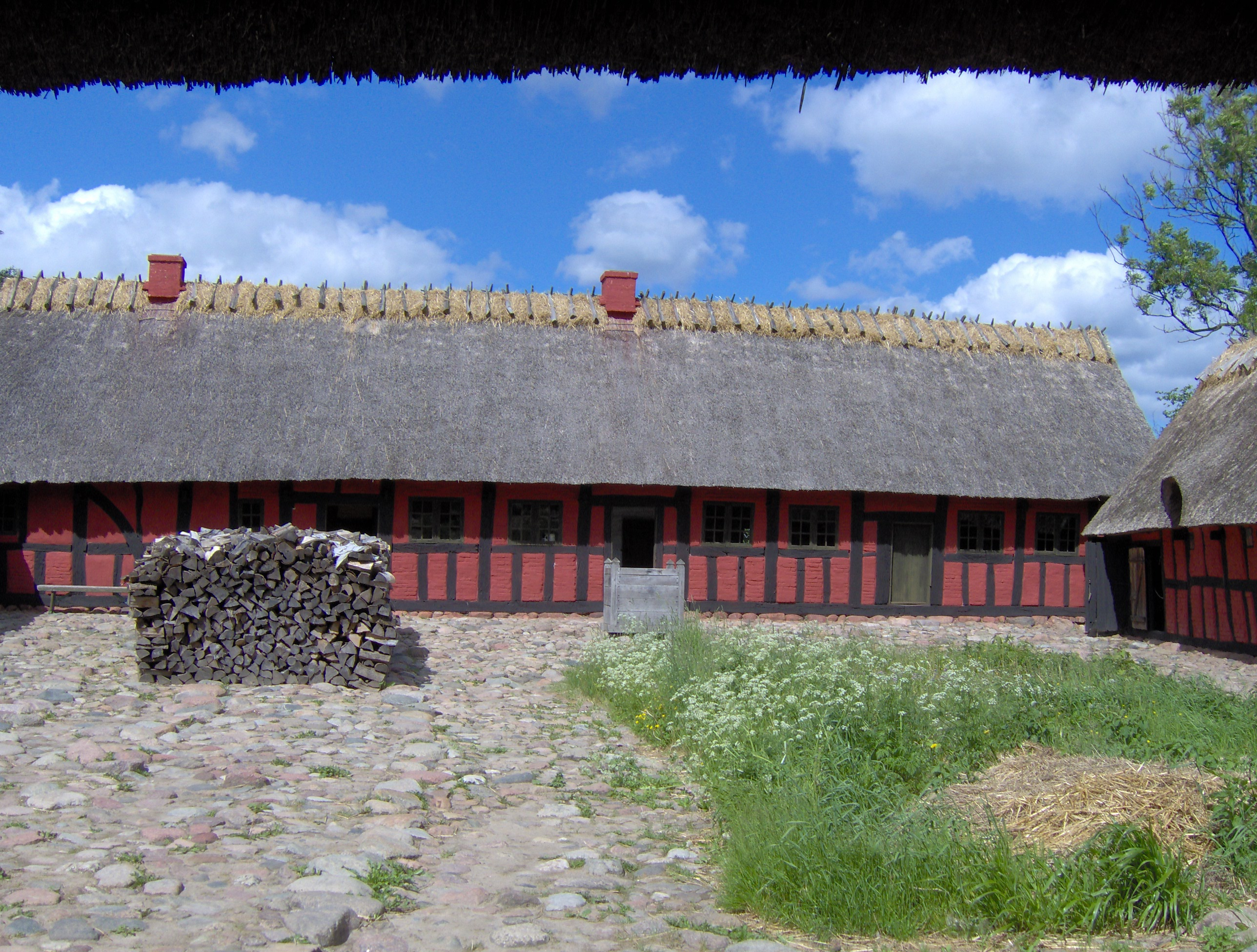 Fotograferet på gården fra True på Frilandsmuseet ved København